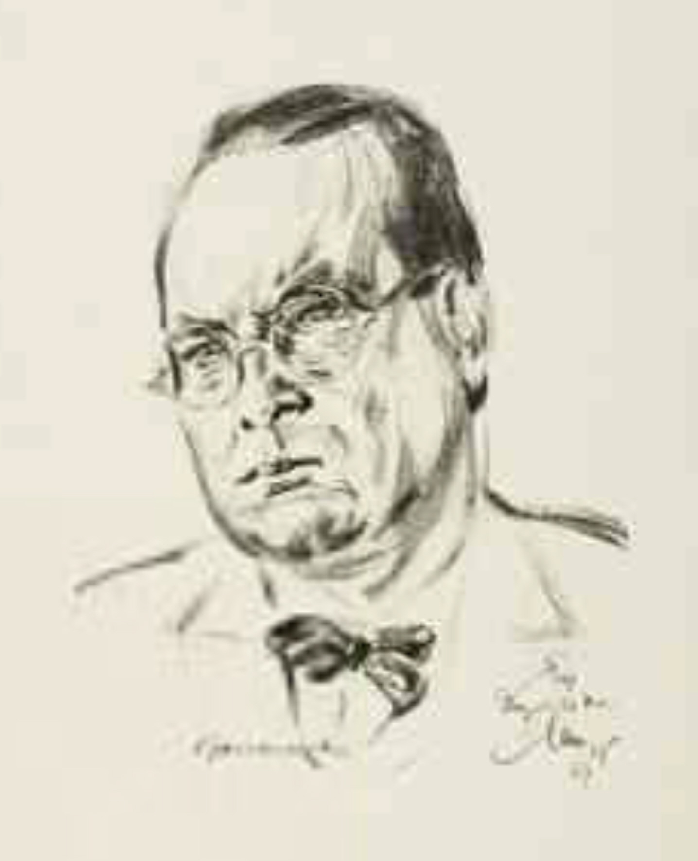 Willi Baumeister (* 22. Januar 1889 in Stuttgart; † 31. August 1955 in Stuttgart), deutscher Maler, Bühnenbildner, Akademieprofessor und Typograf